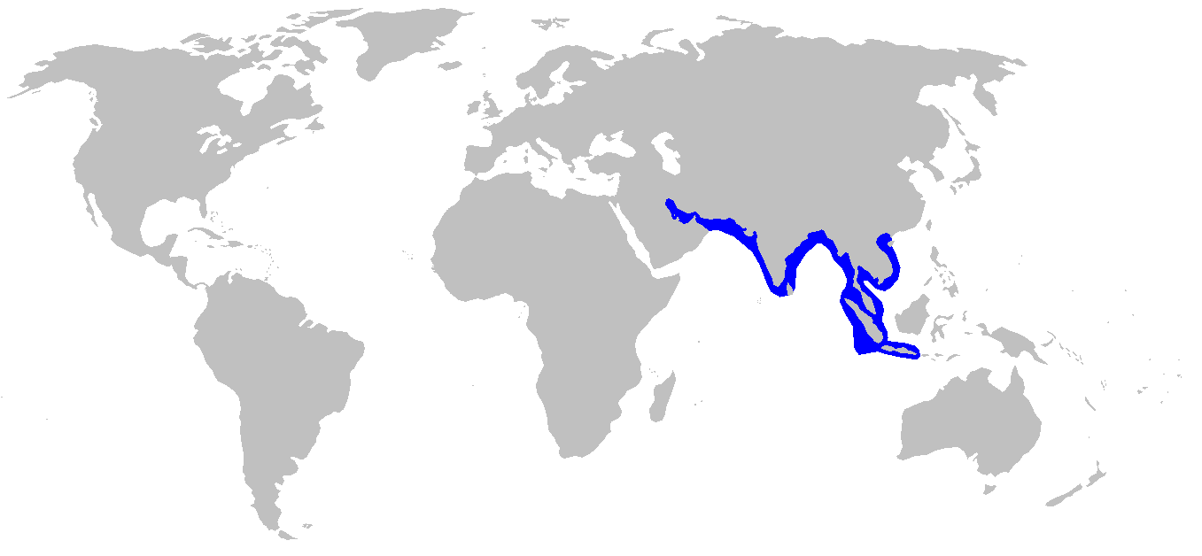 Distribution map for Rhizoprionodon oligolinx